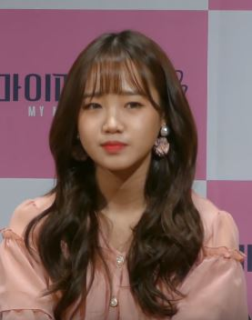 26일 오후 서울시 마포구 상암동 JTBC 사옥에서 JTBC4 신규 예능프로그램 ‘마이 매드 뷰티3’ 제작발표회가 열렸다.